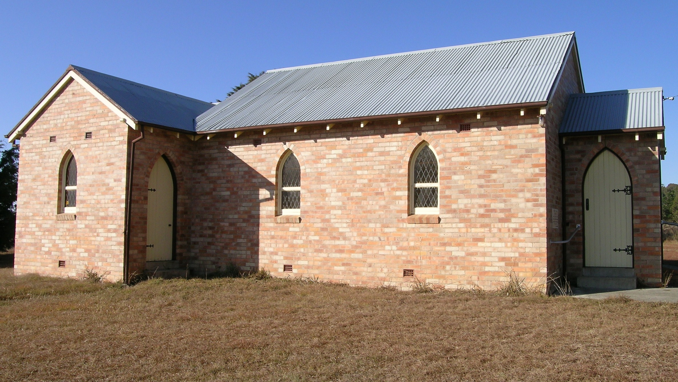 Church, Dundee, NSW